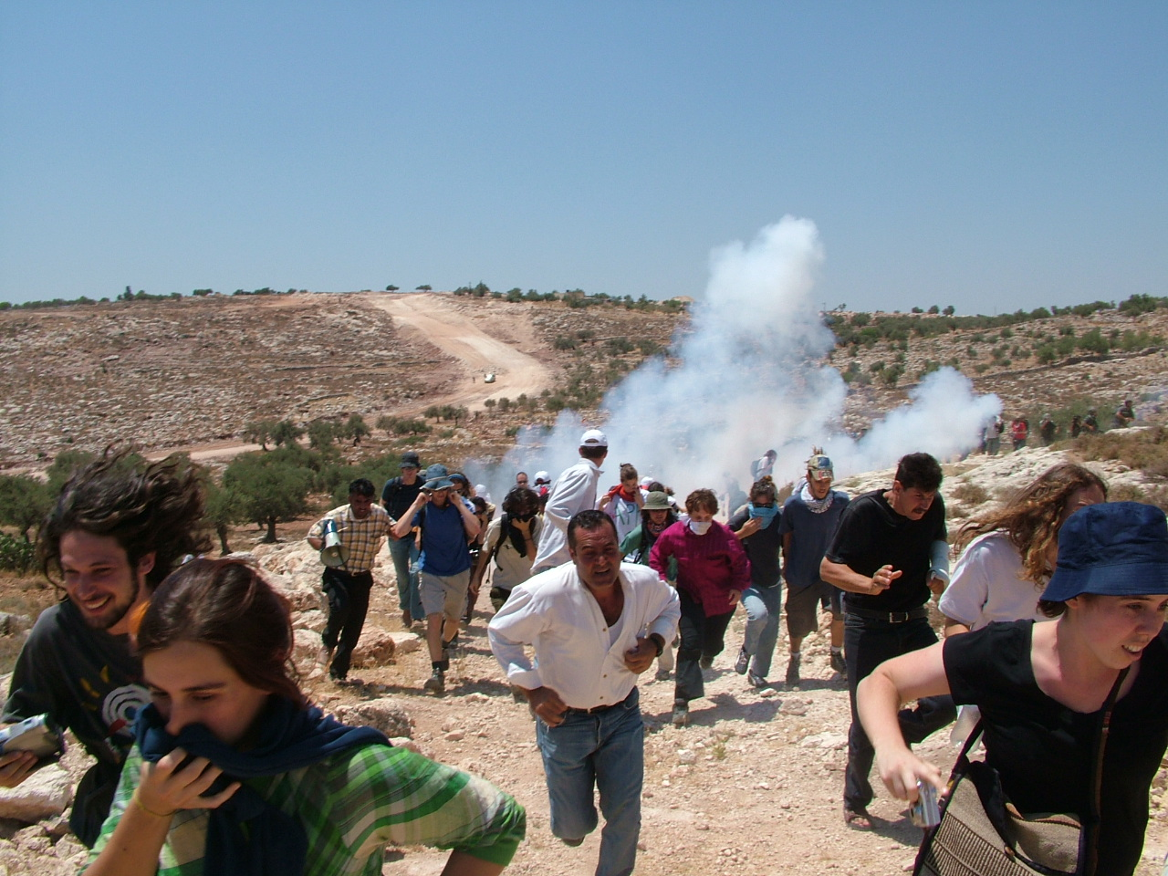 פיזור הפגנה נגד גדר ההפרדה בבלעין Bil'in, demo against security barrier 2005